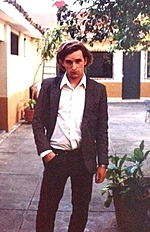 Photo of the austrian writer Reinhard Kaiser-Mühlecker